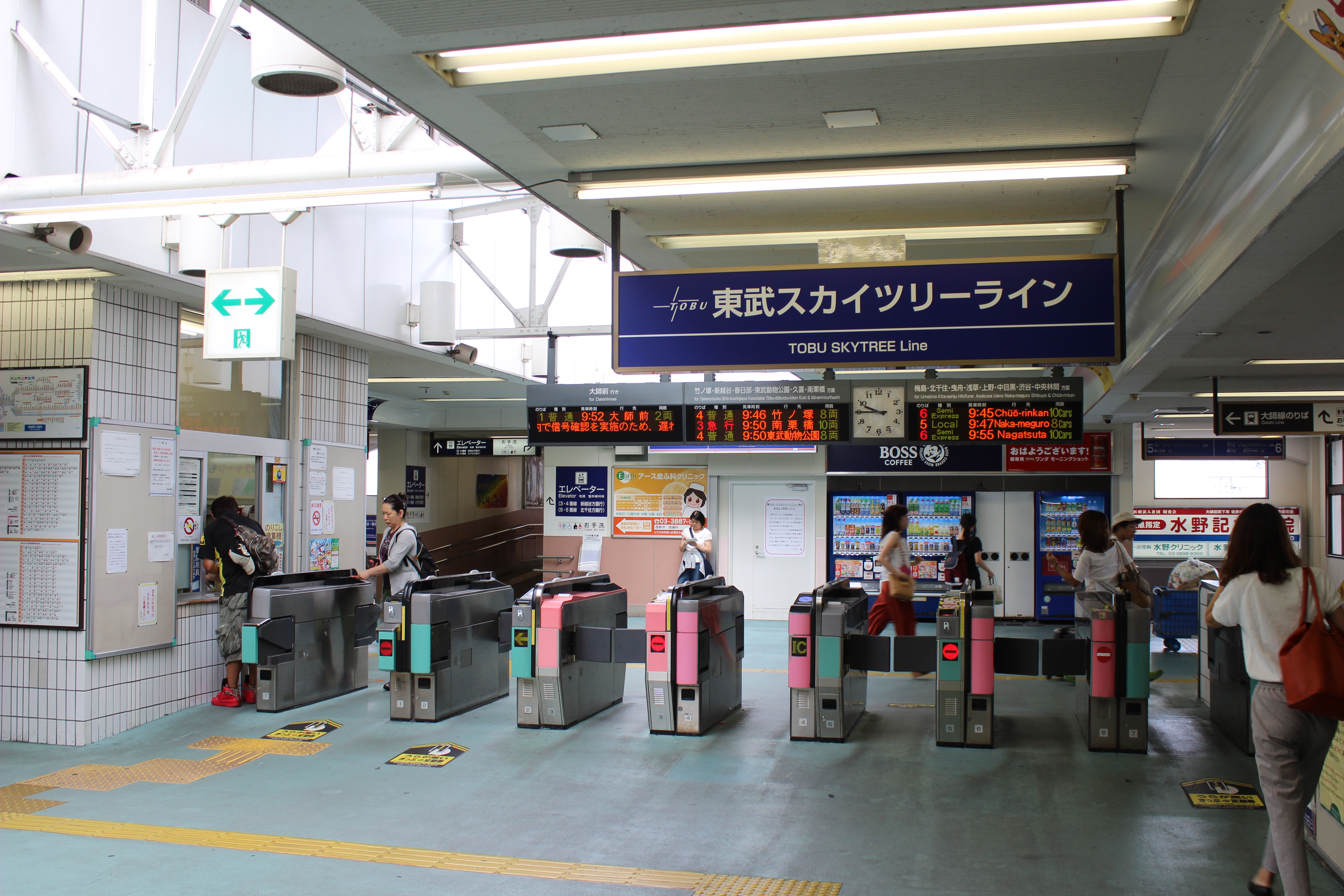 西新井駅中央改札口